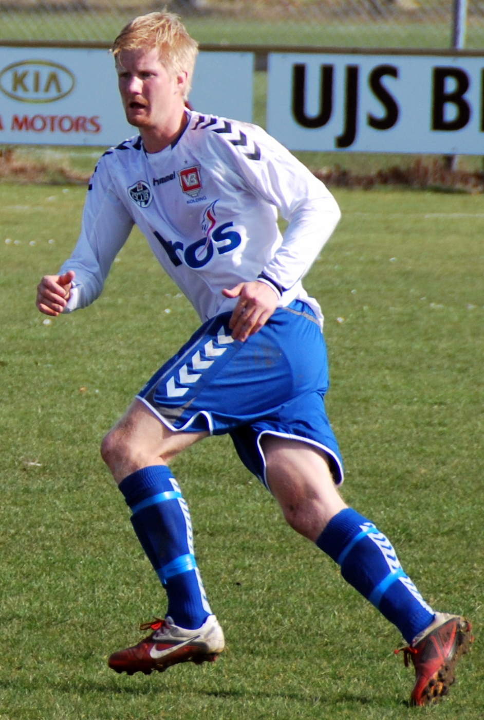 Fodboldspilleren Thomas Mikkelsen fra Vejle Boldklub Kolding. Her i en testkamp mod Viborg FF på VFFs træningsanlæg på Kirkebækvej i Viborg.